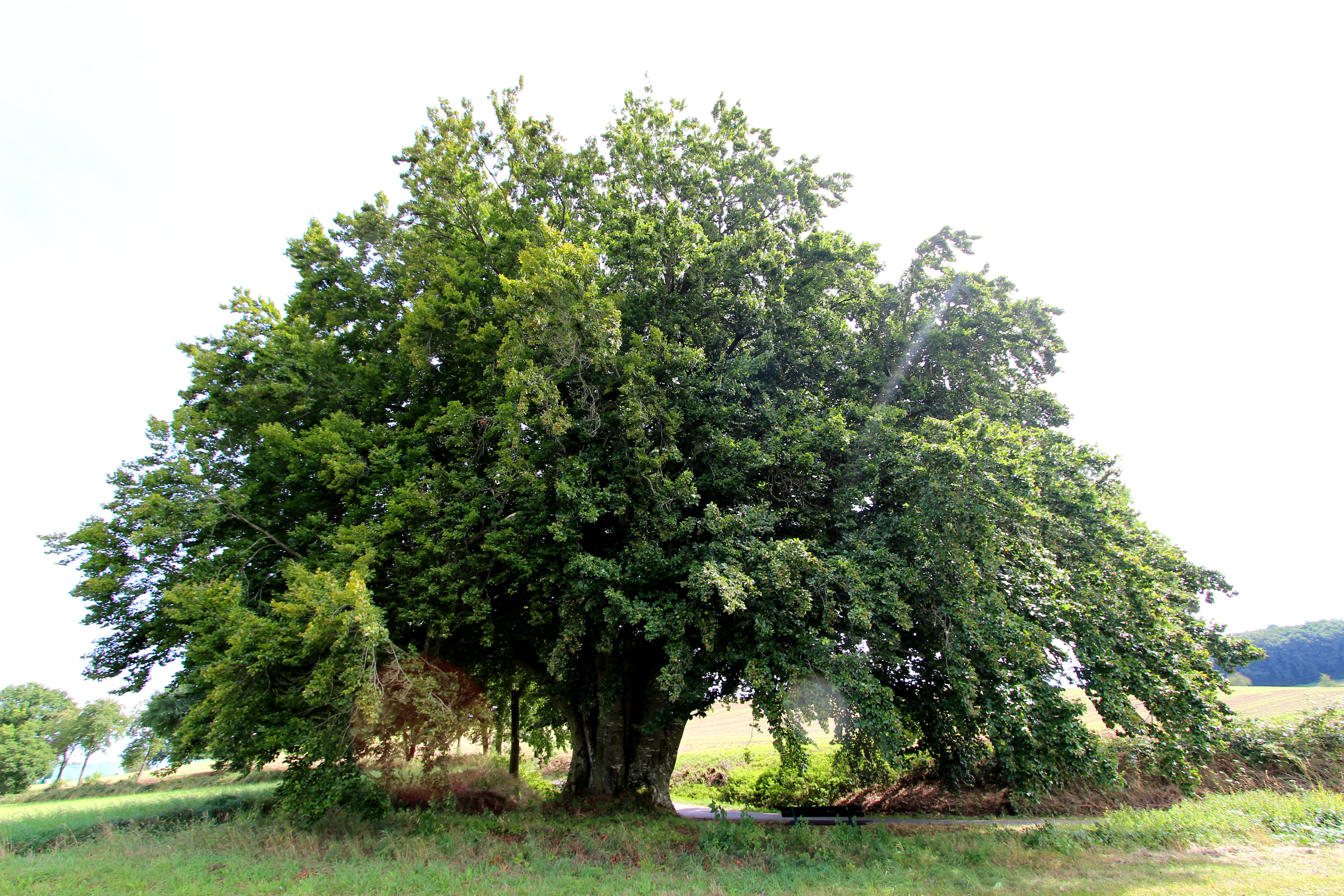 54636 Hütterscheid in der Eifel. Mehrstämmige Rotbuche Fagus sylvatica, um 1800 gekeimt; an der Feilsdorfer Straße. Aufnahme aus Westen von 2016.